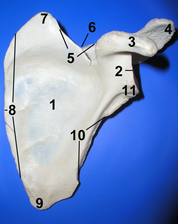 Scapula, Facies ventralis Fossa subscapularis Angulus lateralis with Cavitas glenoidalis Processus coracoideus Acromion Margo superior Incisura scapulae Angulus superior Margo medialis Angulus inferior Margo lateralis Tuberculum infraglenoidale